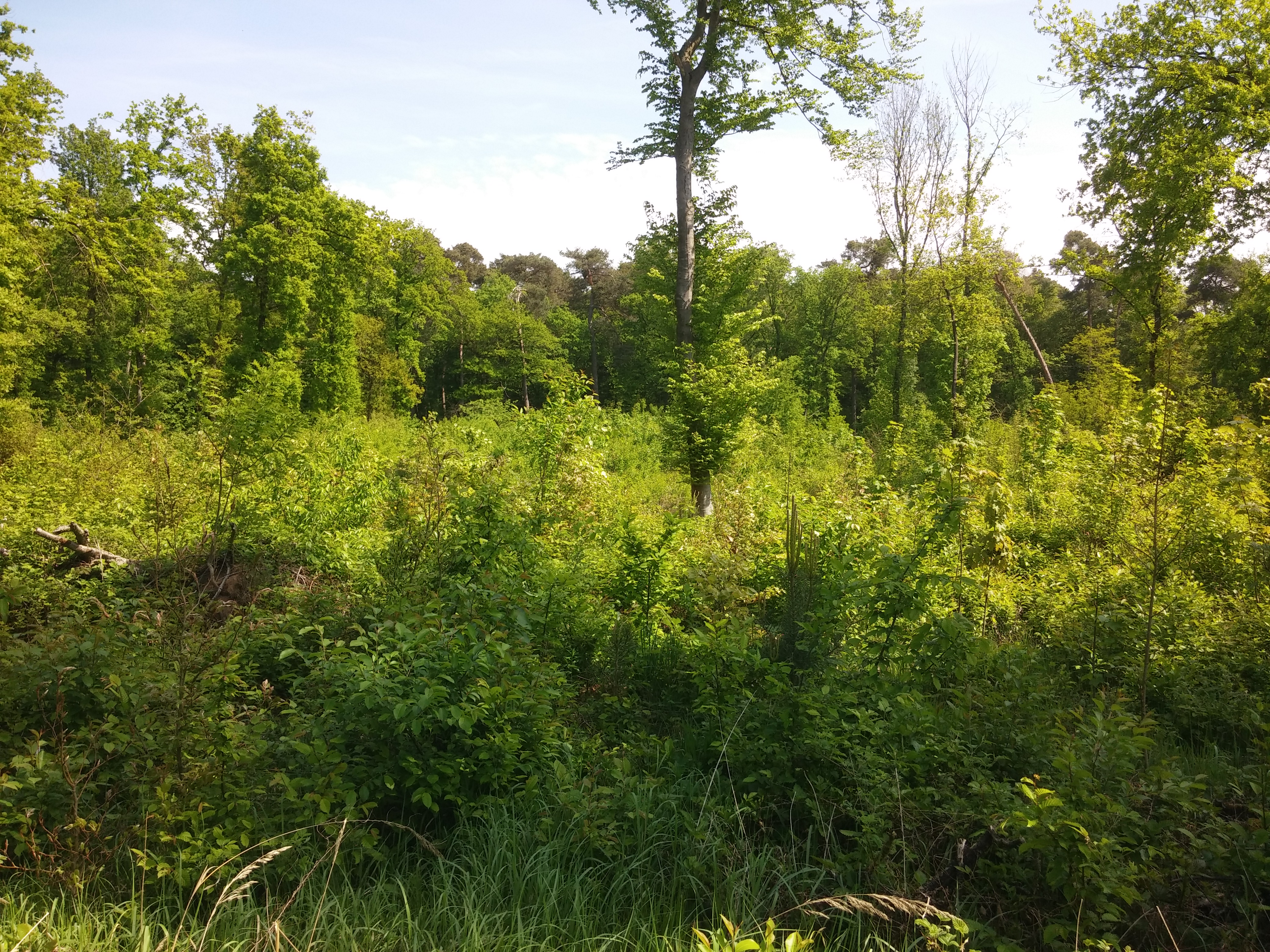 Binnendüne